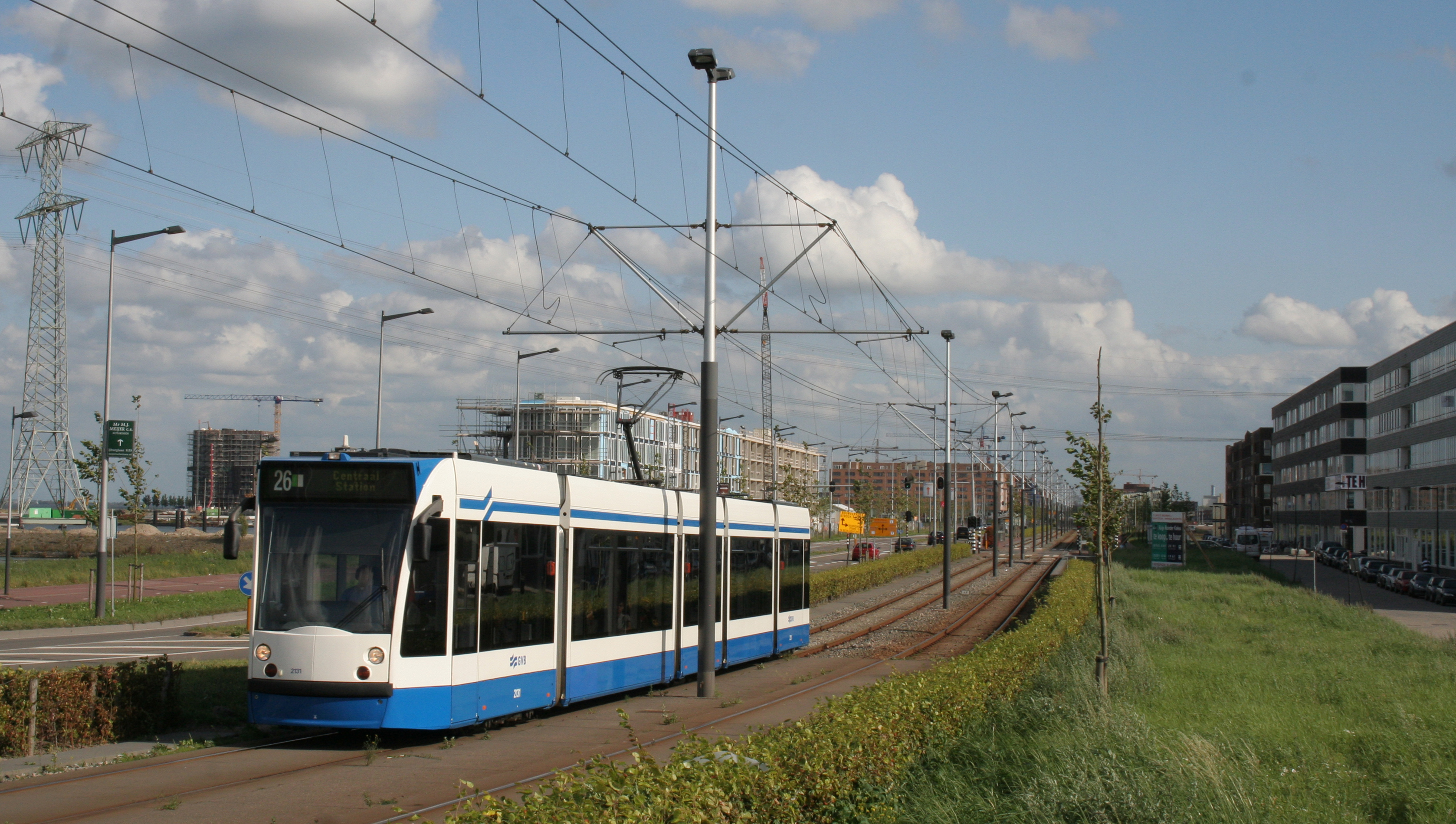 Een Combino van tramlijn 26, de IJtram, op de IJburglaan op het Steigereiland.